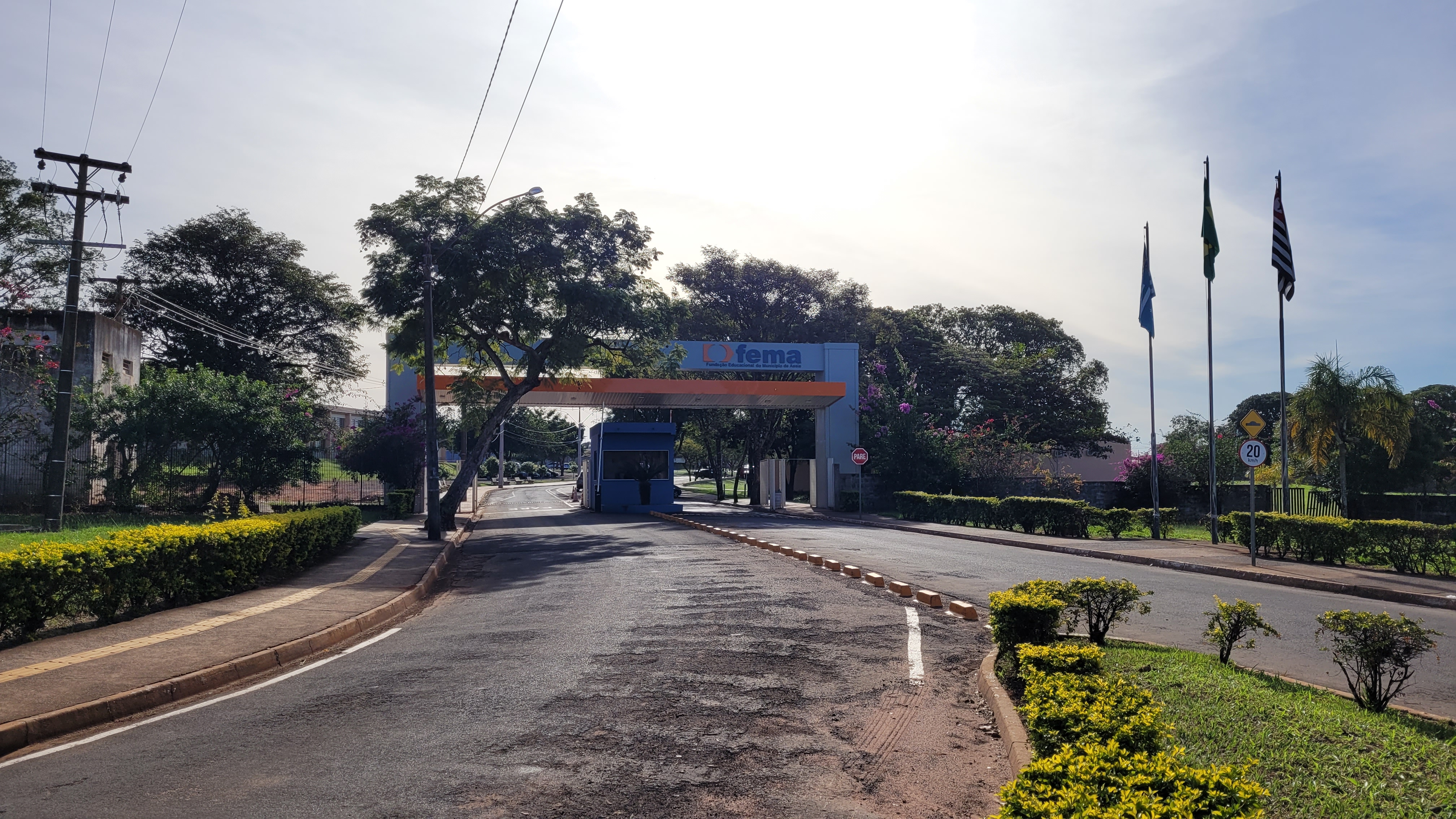 Portaria da Fundação Educacional do Município de Assis